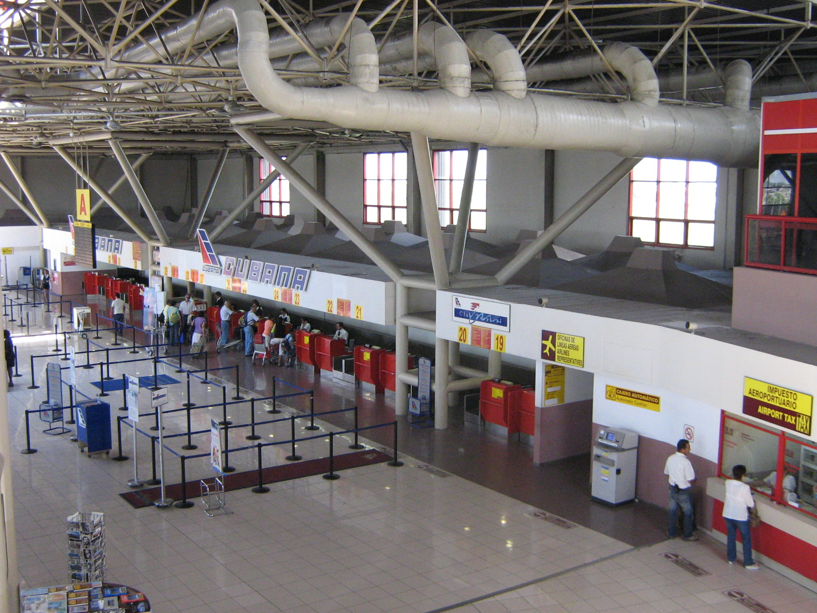 Mostradores de facturacion de Cubana de aviacion en la T3 del Aeropuerto de La Habana